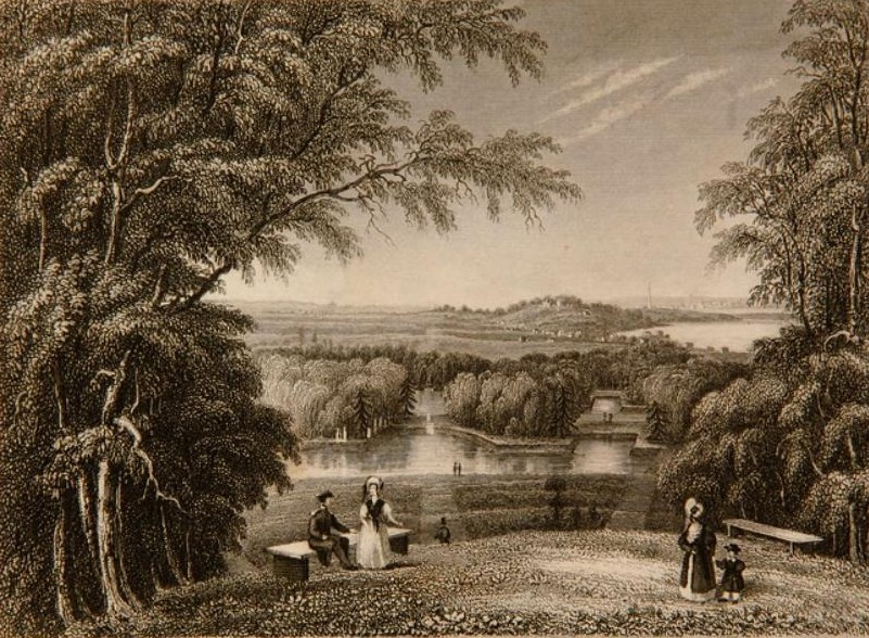 Сад княгини Бутера в Парголово.